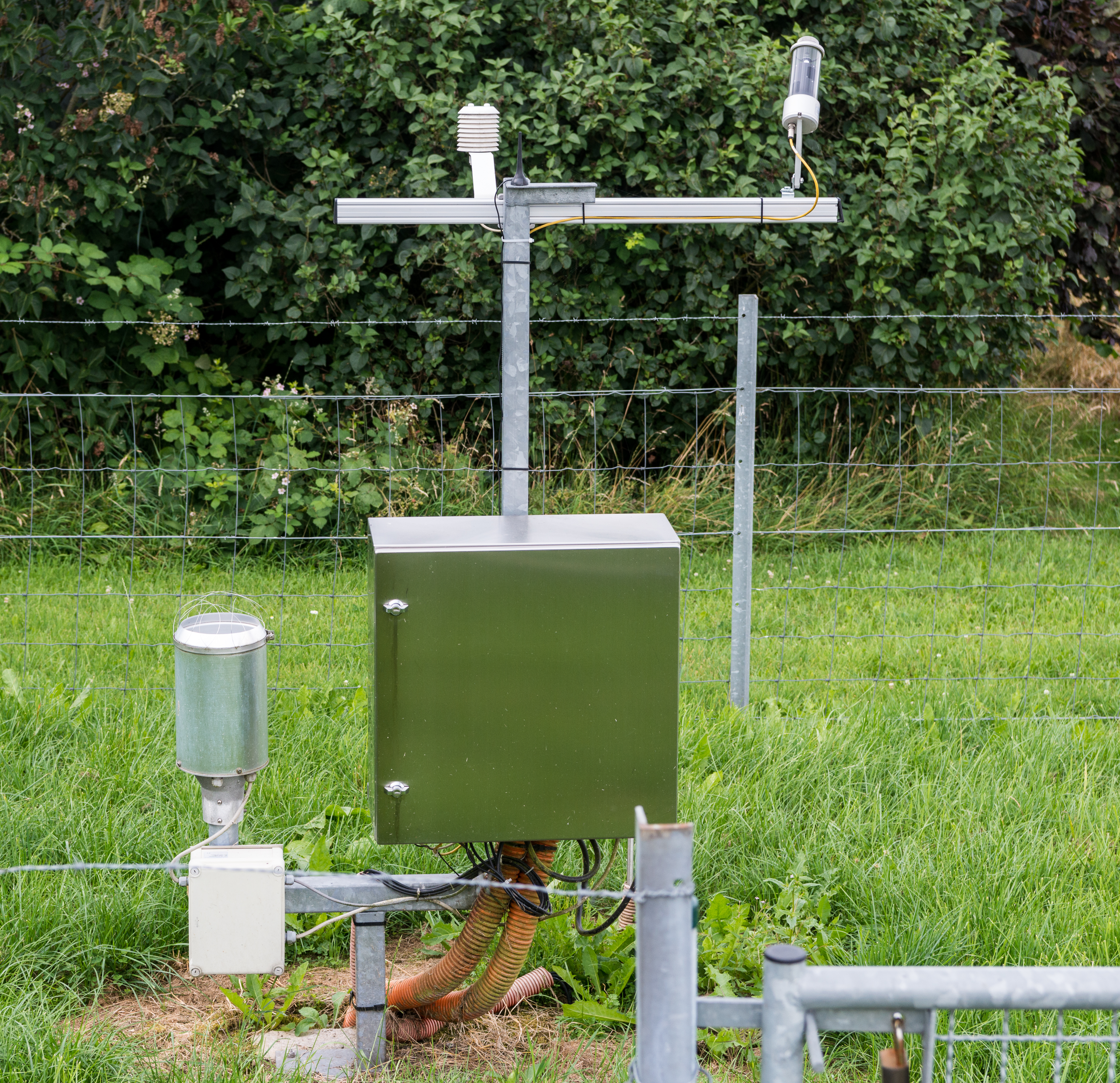 D'automatesch Wiederstatioun zu Dol.